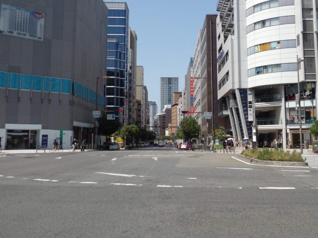 四つ橋筋・四ツ橋交差点